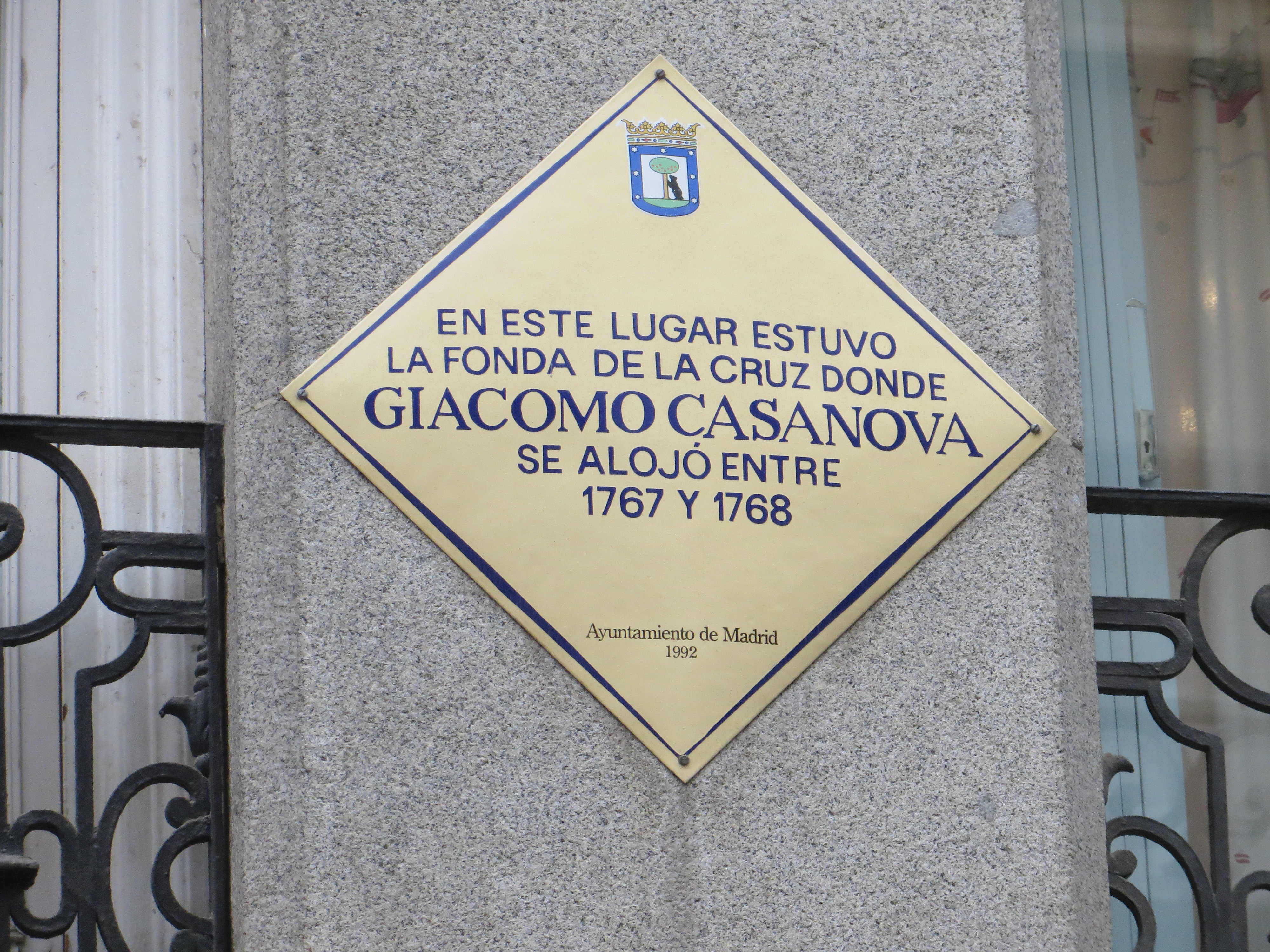 Targa commemorativa del soggiorno di Giacomo Casanova a Madrid. Si trova all'altezza del civico 13 della Calle de Espoz y Mina, nelle vicinanze della Puerta del Sol. Il testo ricorda la permanenza di Casanova nella Locanda della Croce.